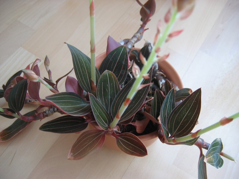 Zimmer-Orchidee Ludisia discolor